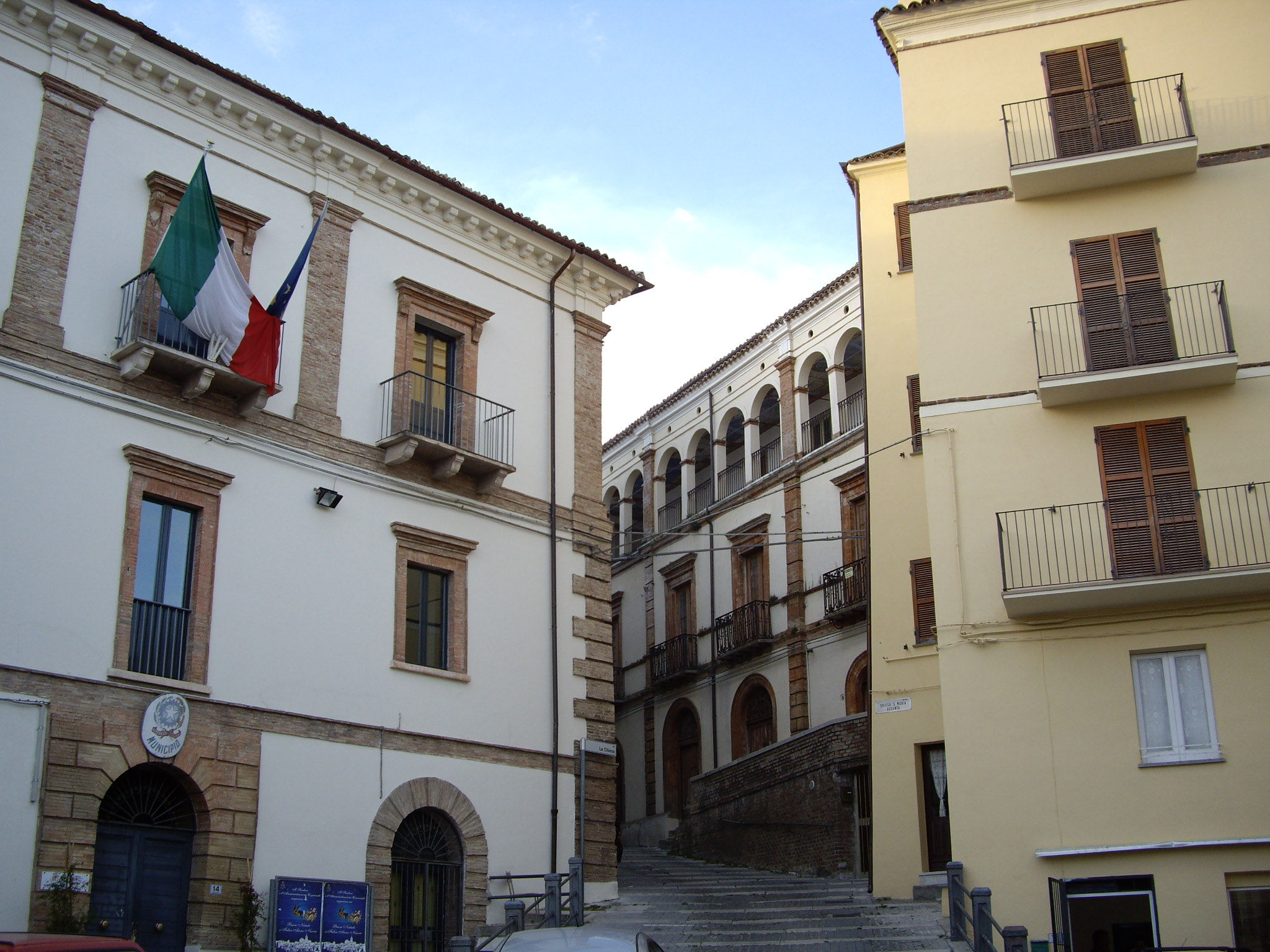 Autore: Giuseppe Paolelli - Municipio di Gissi ( Palazzo Carunchio )